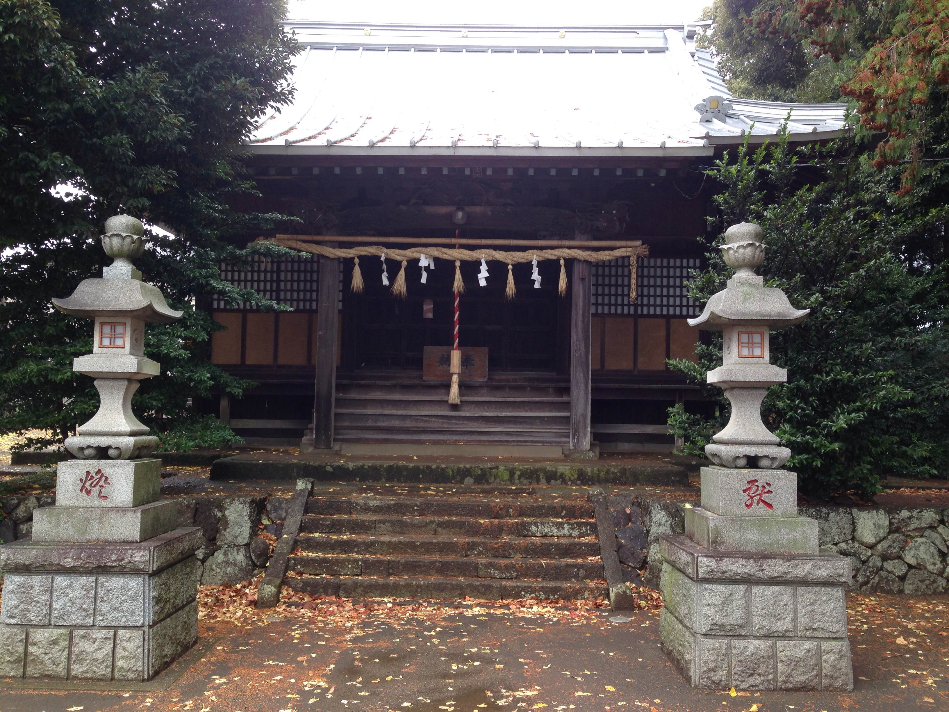 神奈川県厚木市の小野神社拝殿。